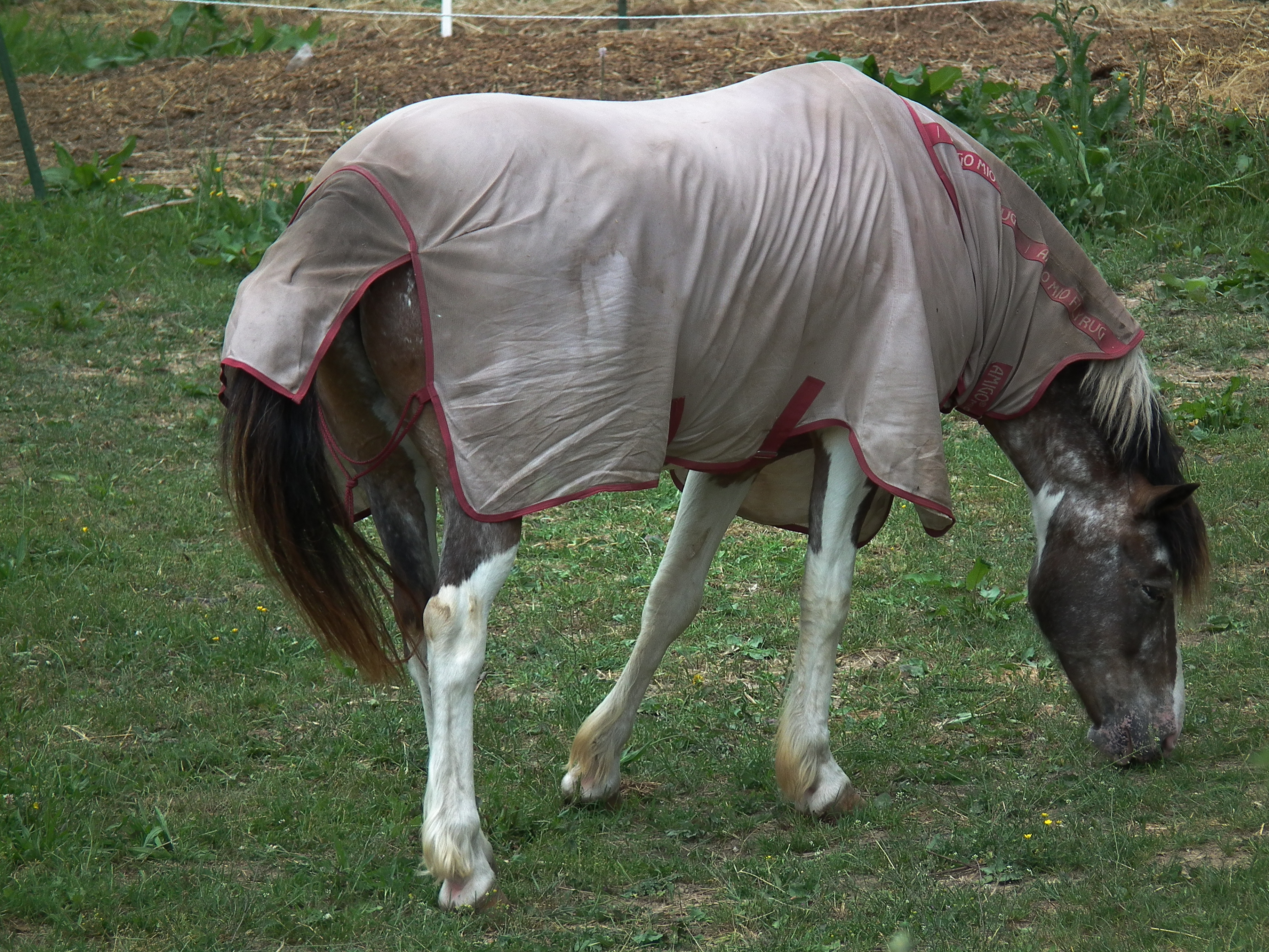 Weidendes Pferd mit gewachster Pferdedecke, fotografiert in Zuzenhausen (Baden-Württemberg, Deutschland)